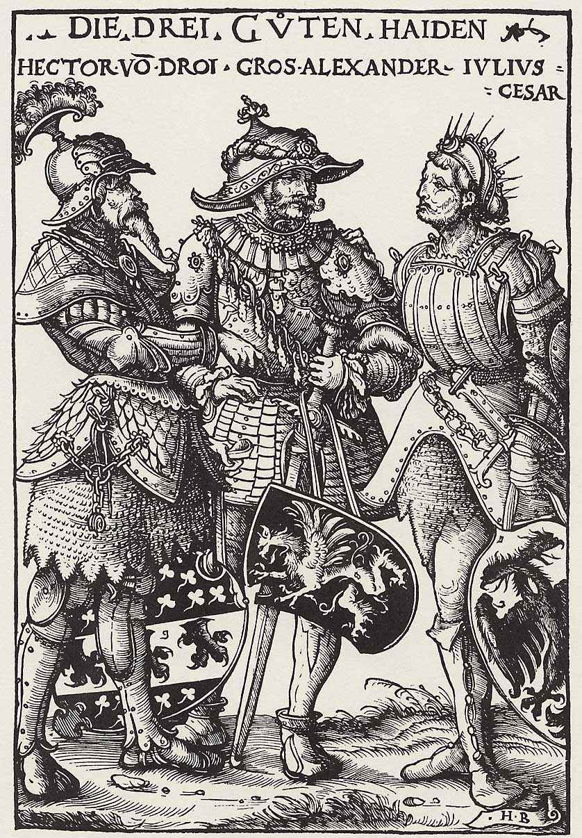 Drei heidnische Helden: Hektor, Alexander und Cäsar Technik: Holzschnitt, Maße: 19,5 × 13 cm, Sammlung: Staatliche Kunstsammlungen Dresden, Kupferstich-Kabinett